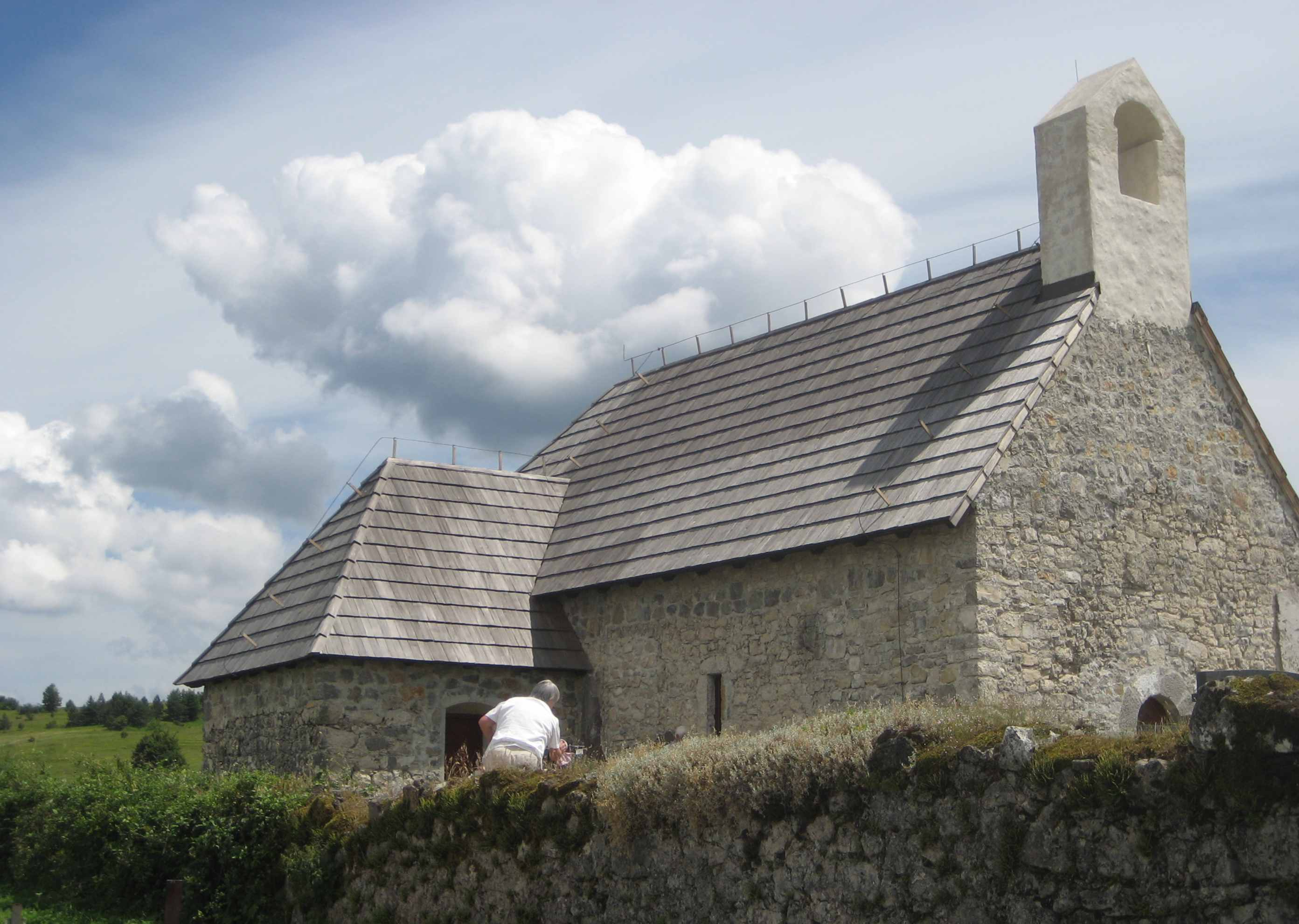 Church BDM od Rozarija, Saborsko